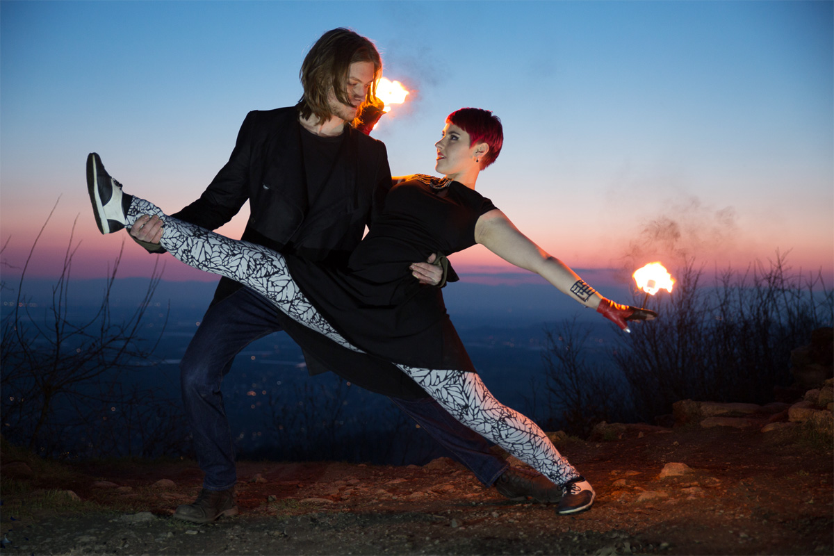 Artistenduo zeigt zeitgenössische Feuershow mit Tanz & Akrobatik